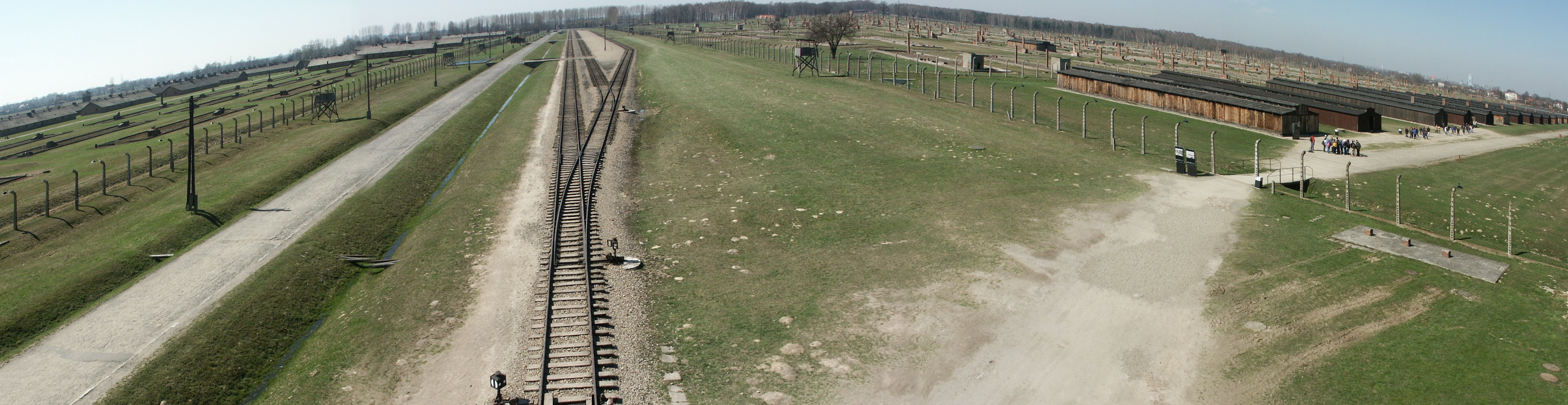 KZ Auschwitz-Birkenau, Gesamtüberblick vom Eingangsgebäude zur Bahnrampe und zum Lagerbereich, 2007, Panoramamontage; eigene Aufnahme des Autors